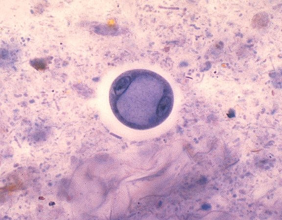 Se muestra el protozoario Entamoeba Coli en su fase de quiste inmaduro.